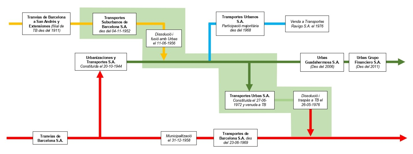 Historiograma de les empreses que van donar lloc i van succeir a l'empresa Urbanizaciones y Transportes, que operaba línies de tramvies i autobusos suburbans a Barcelona.